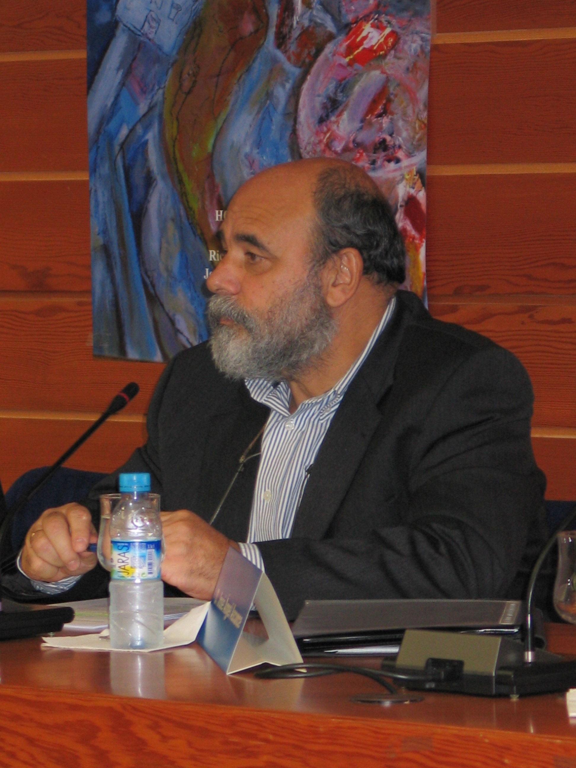 Profesor, crítico literario y escritor